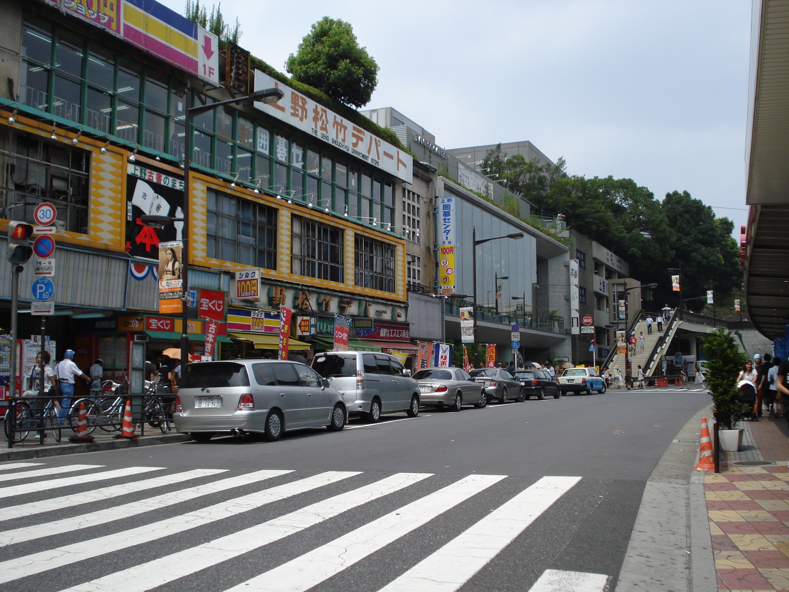 ueno